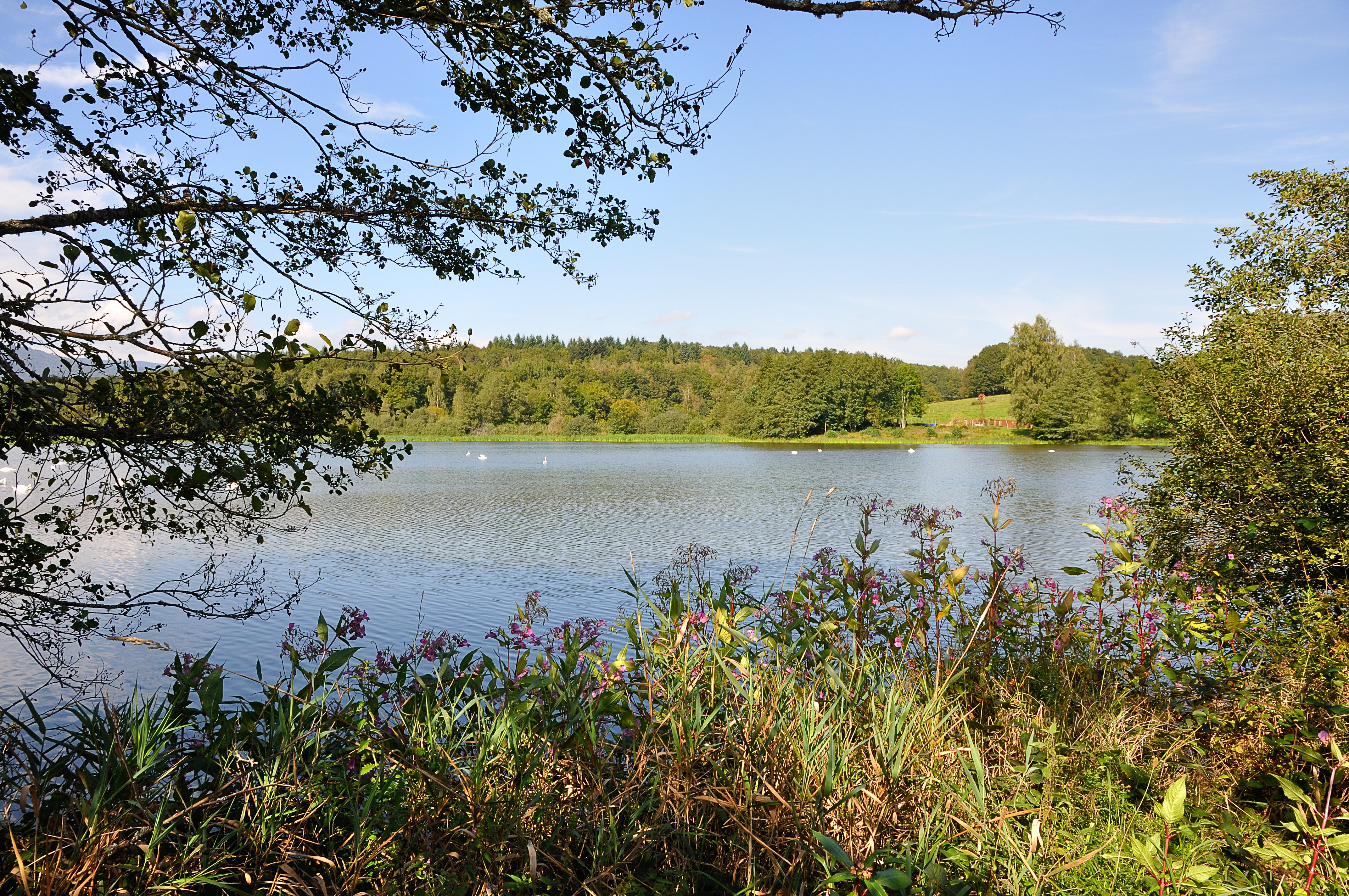 L'étang de la Véronne est un des nombreux plan d'eau qui composent le site du Malsaucy.